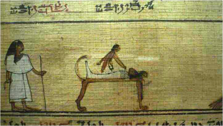 Llit de la Verge d'agost, Mallorca